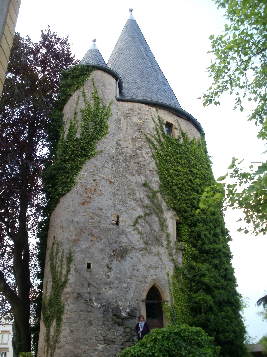 Château de Schengen